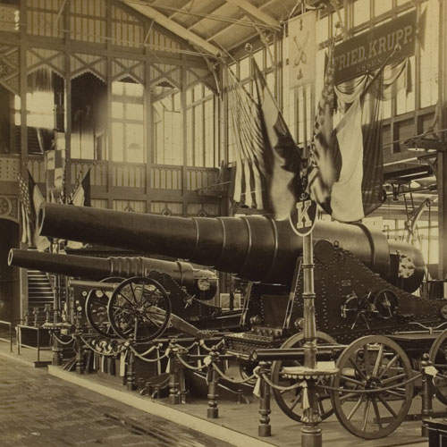 Krupp Exhibit, 1876 Centennial Exhibition, Philadelphia